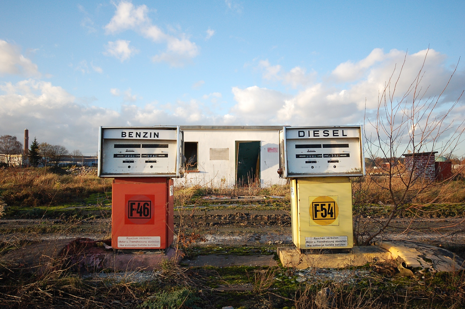 Tankstelle der ehemaligen Napier Barracks im heutigen Baugebiet Hohenbuschei in Dortmund Brackel